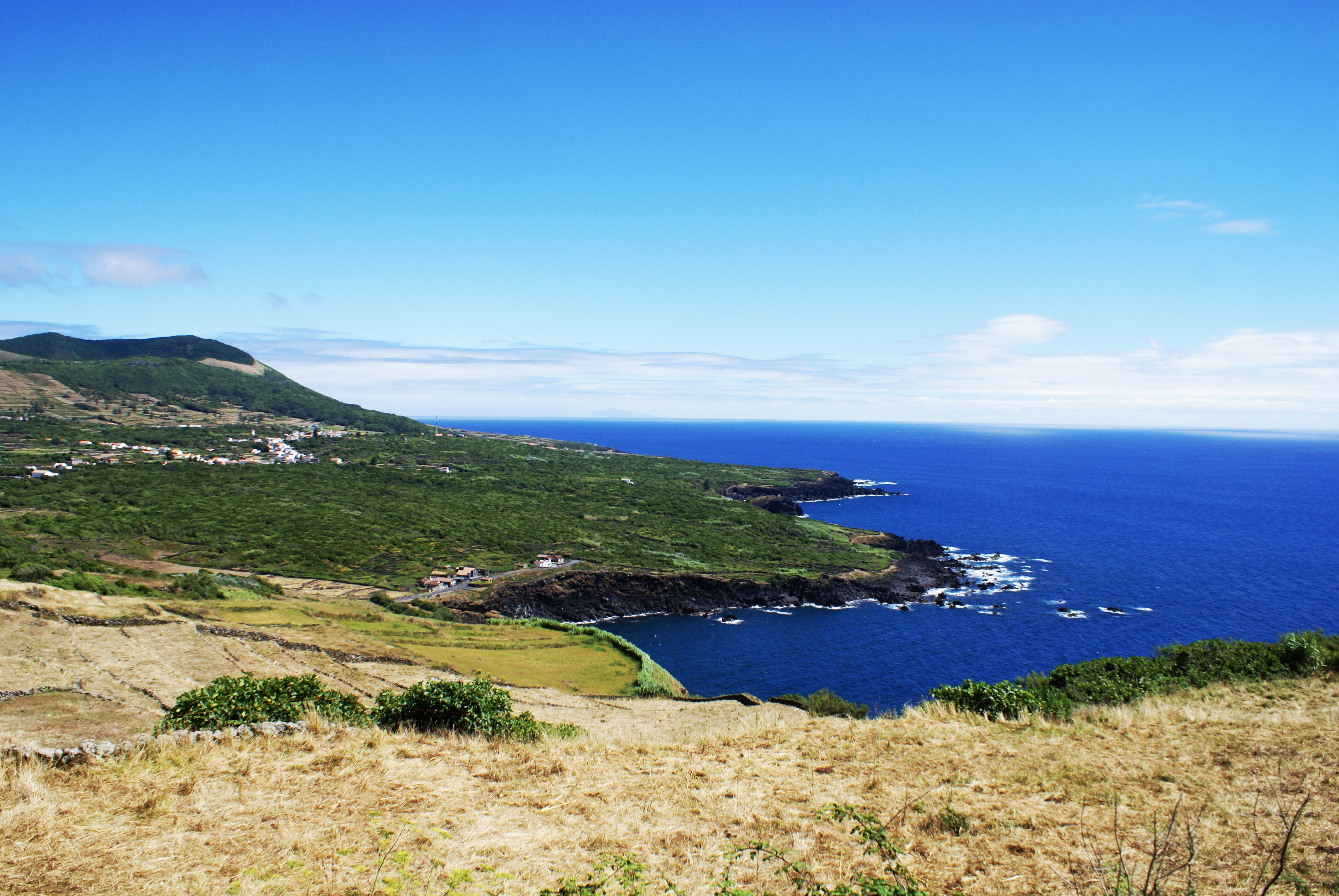 Fajã da Beira Mar, Santa Cruz da Graciosa, ilha Graciosa, Açores, Portugal